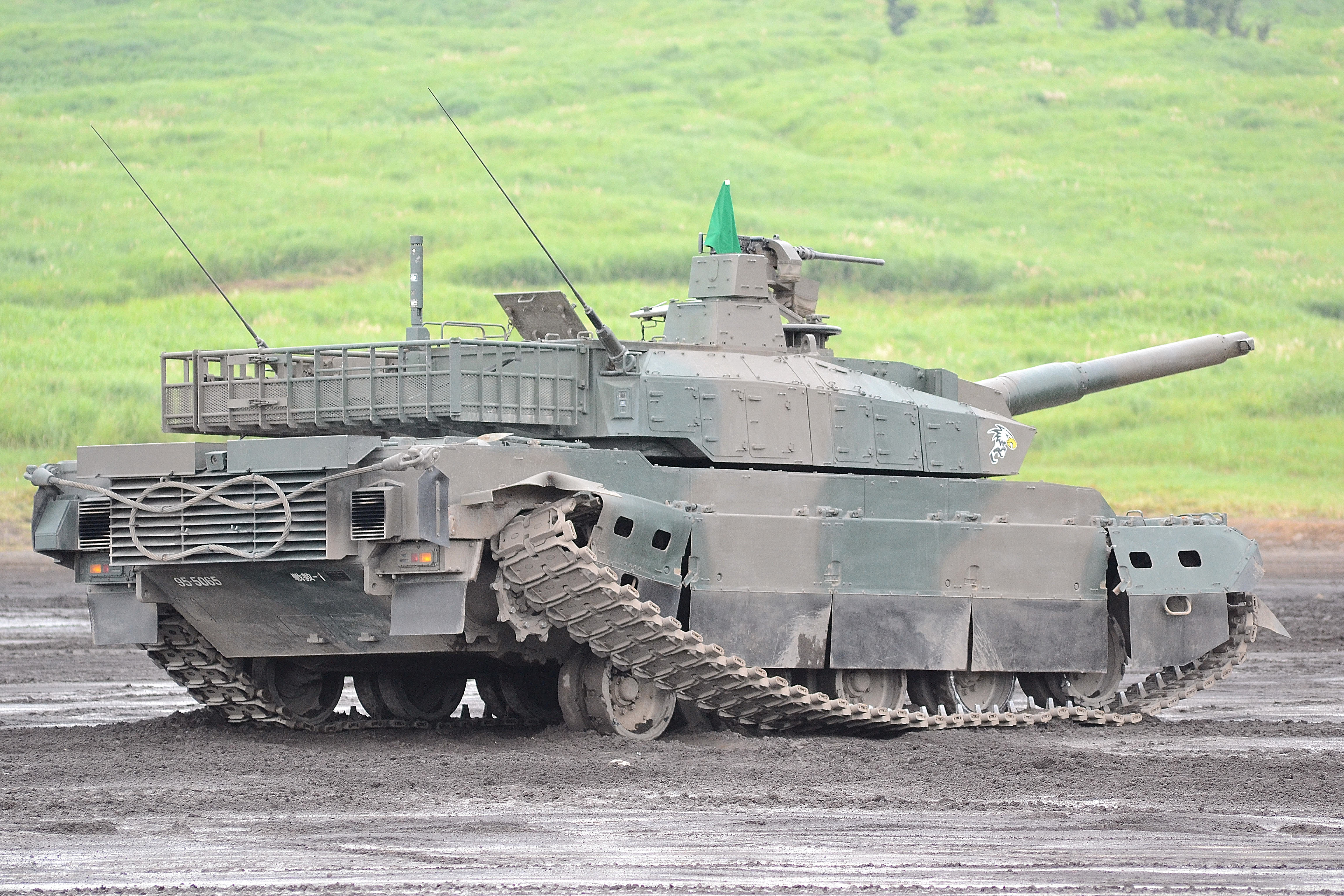 2015年8月23日に行われた富士総合火力演習において、戦車教導隊第1中隊所属の10式戦車が、走行中右側へ大きく方向変換しようとした際に右側の履帯が外れて動けなくなった様子（2015年の東富士演習場で行われた富士総合火力演習において撮影）